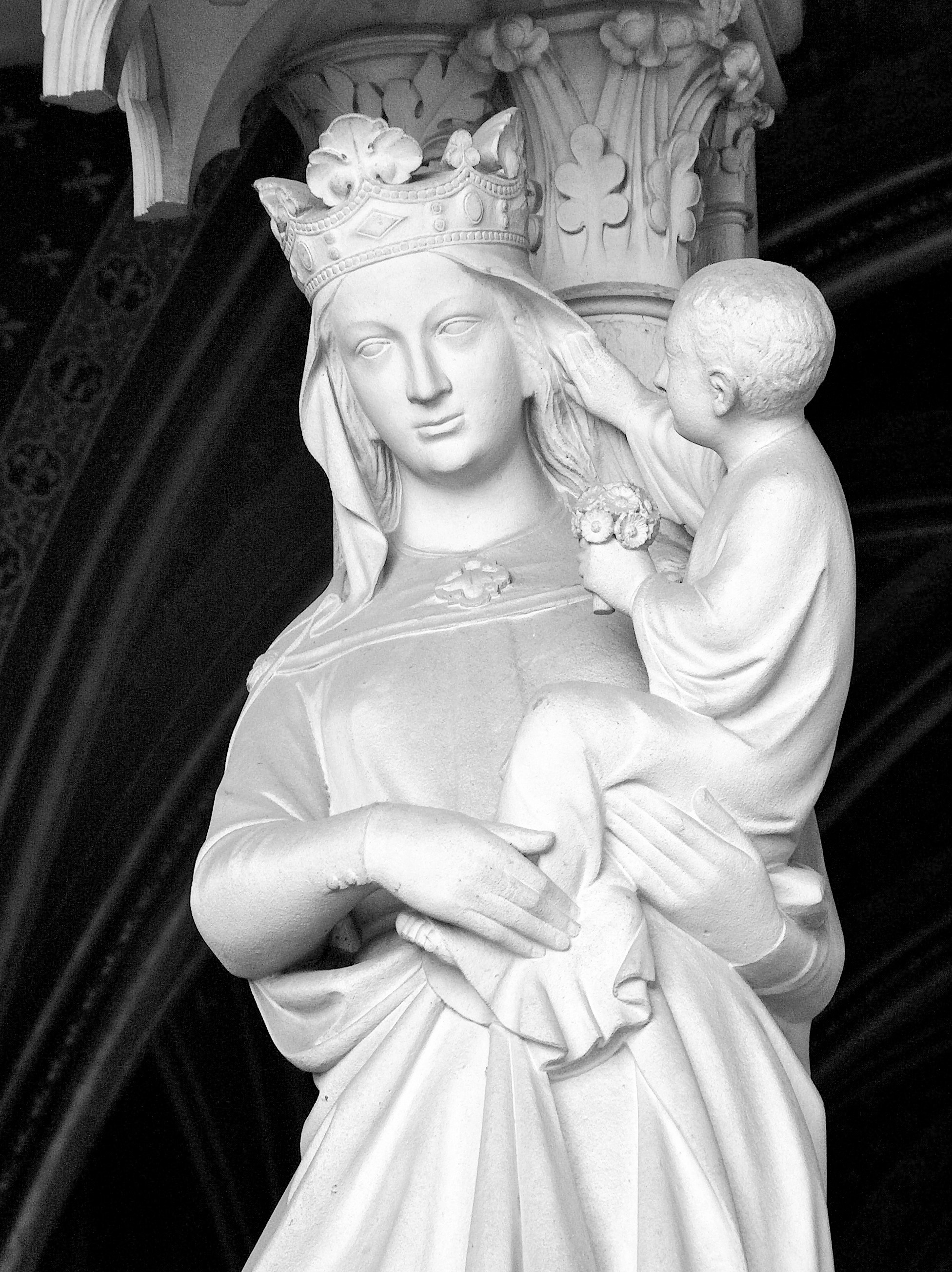 Vierge à l'enfant à l'entrée de la Sainte-Chapelle, Paris